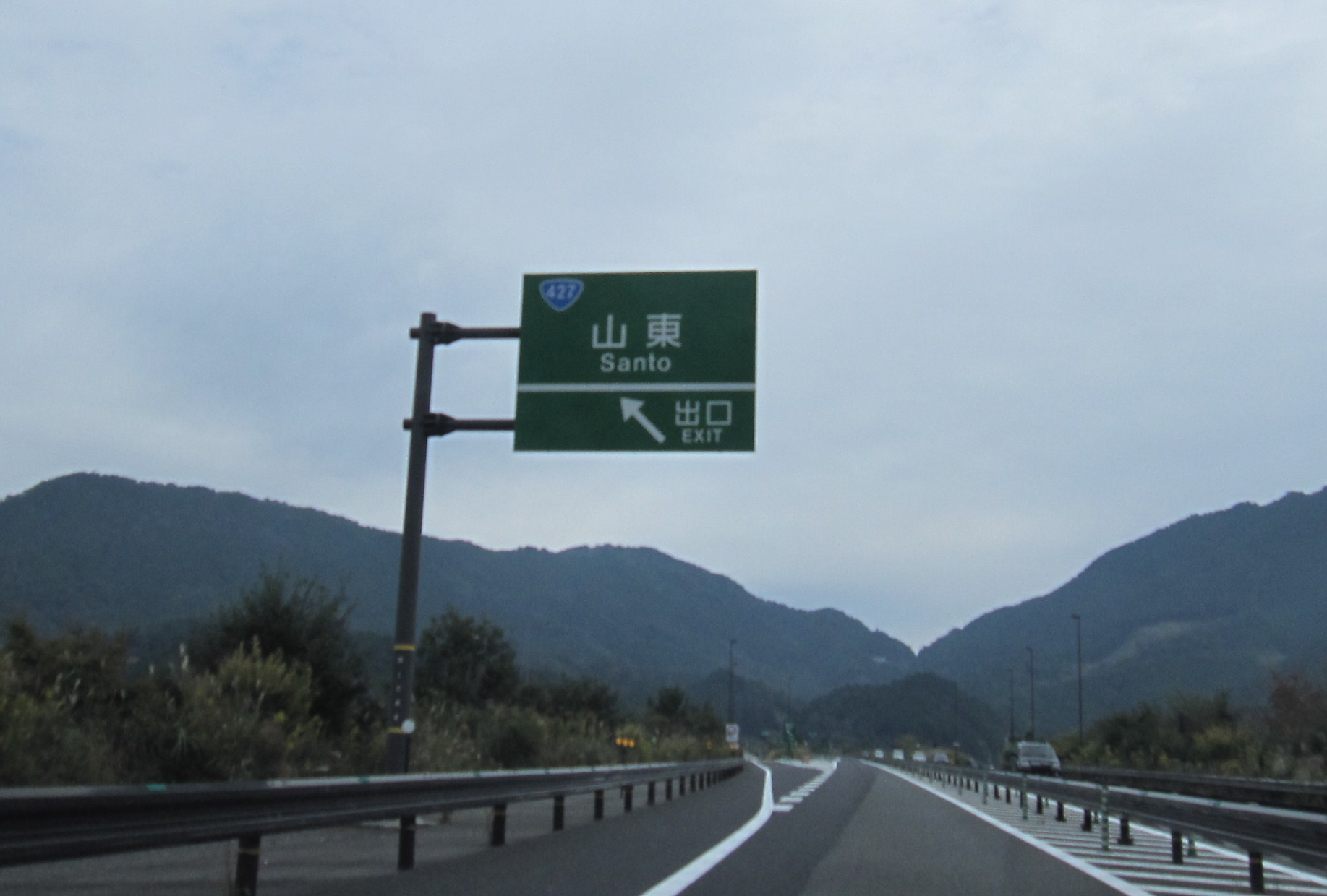 山東インターチェンジ案内板